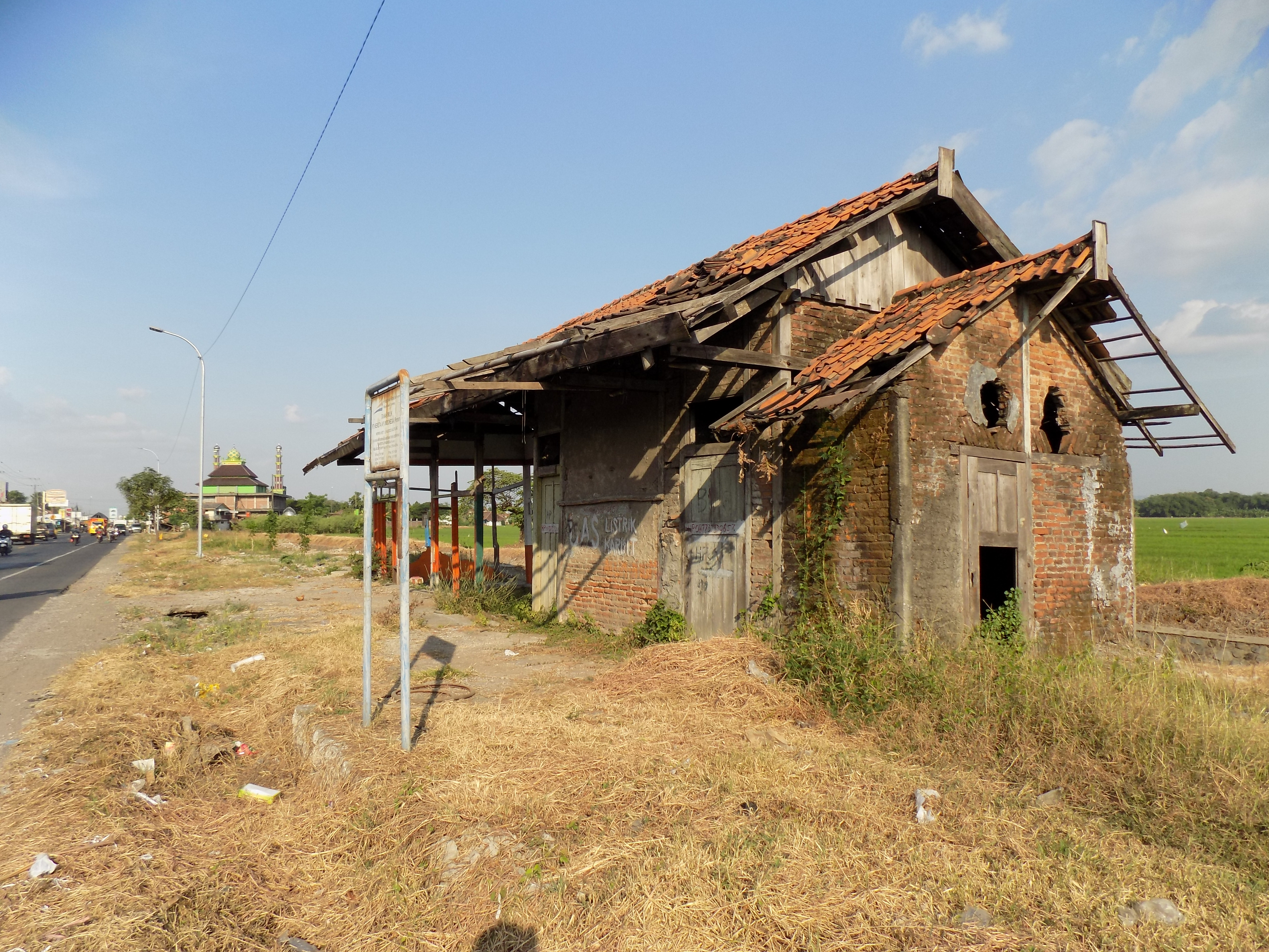 Stasiun Bareng